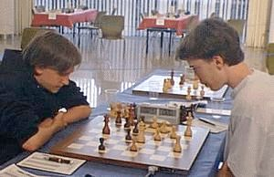 Martin Alexander Becker und Georg Meier bei der Deutschen U16-Einzelmeisterschaft 2003, vom 7. bis 15. Juni 2003 in Willingen (Hessen).